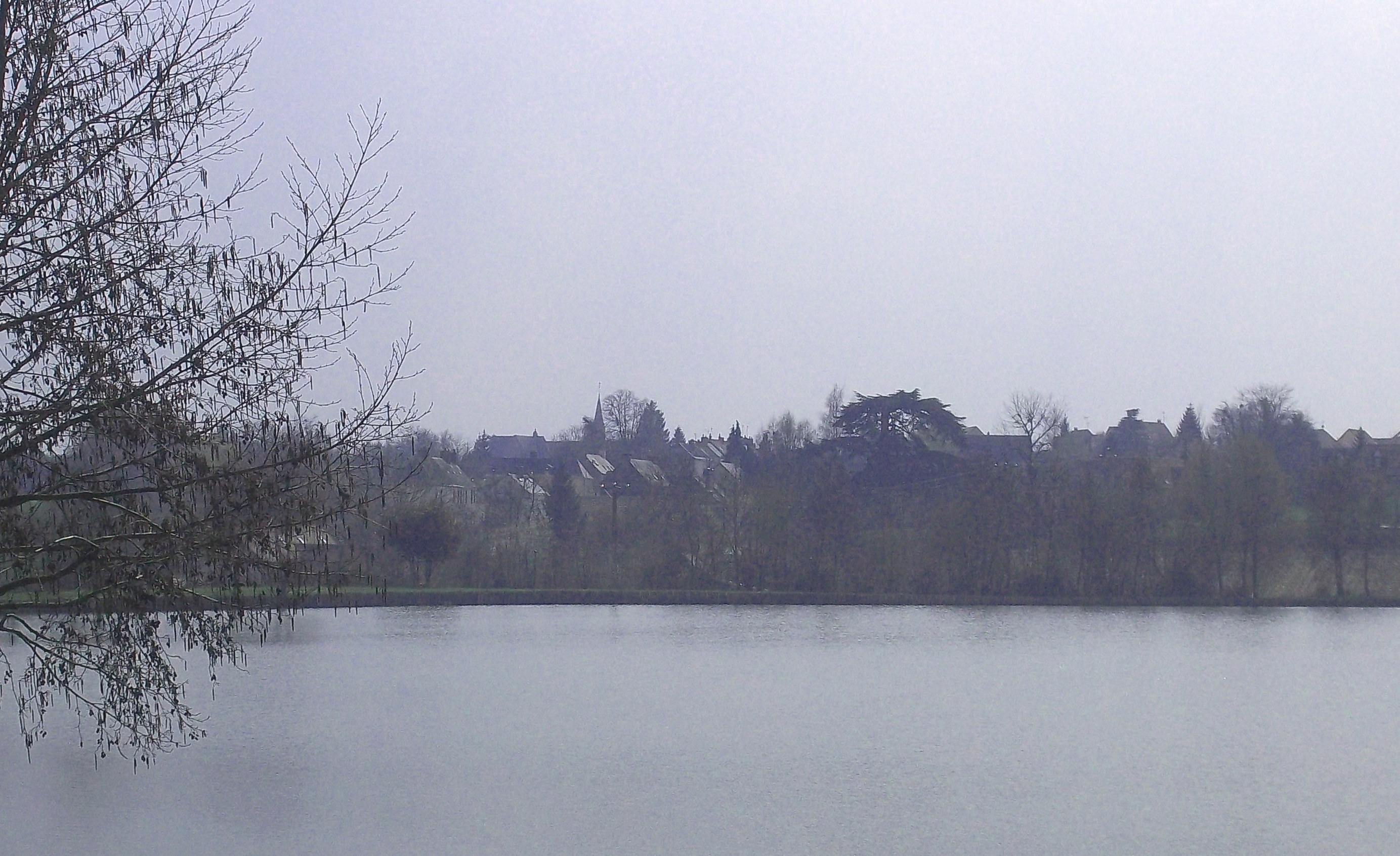 La Bazoge - plan d'eau